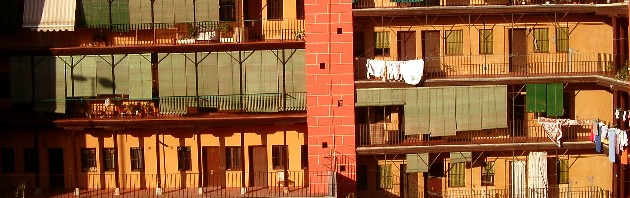 En la calle Mesón de Paredes. Madrid.